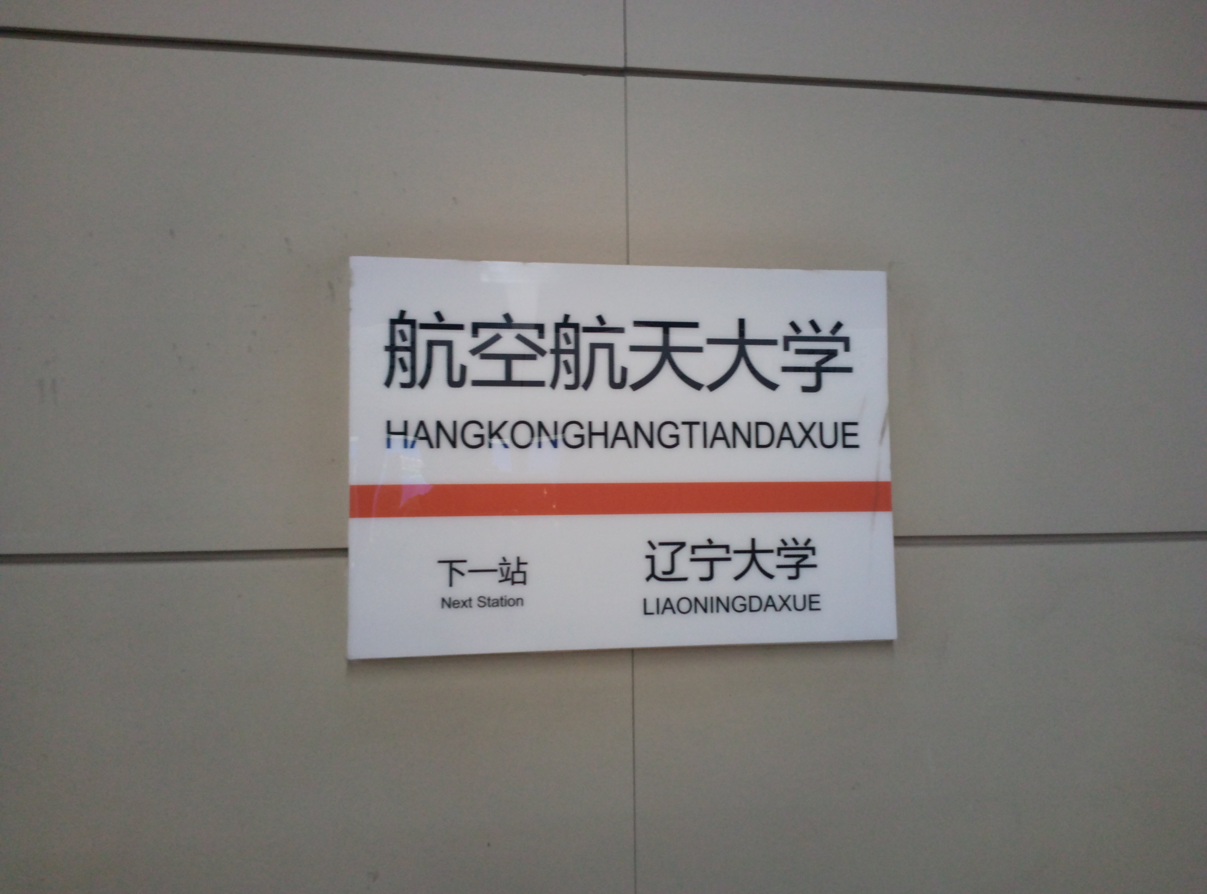 航空航天大学站新版月台指示牌。